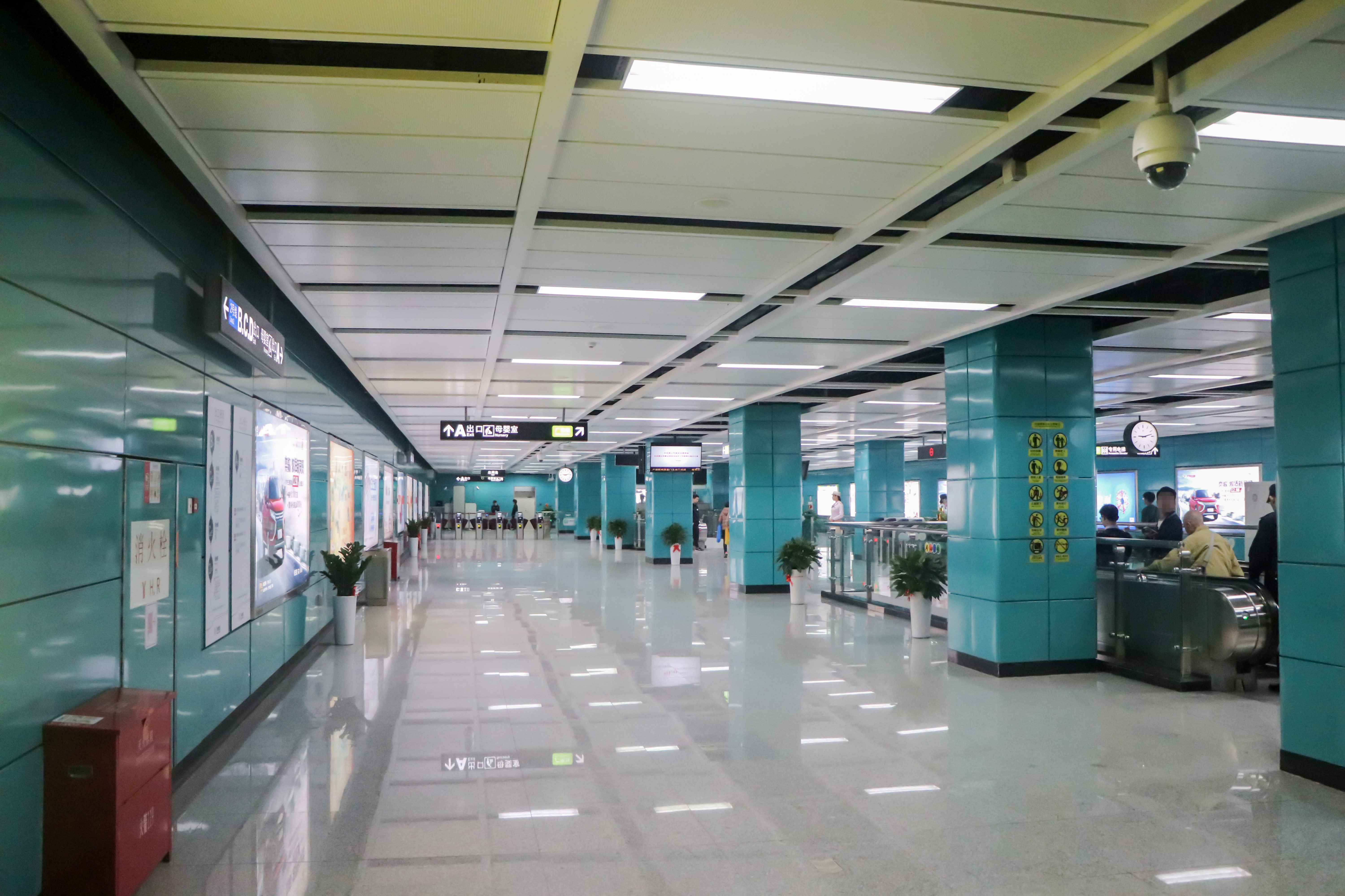 广州地铁南洲站